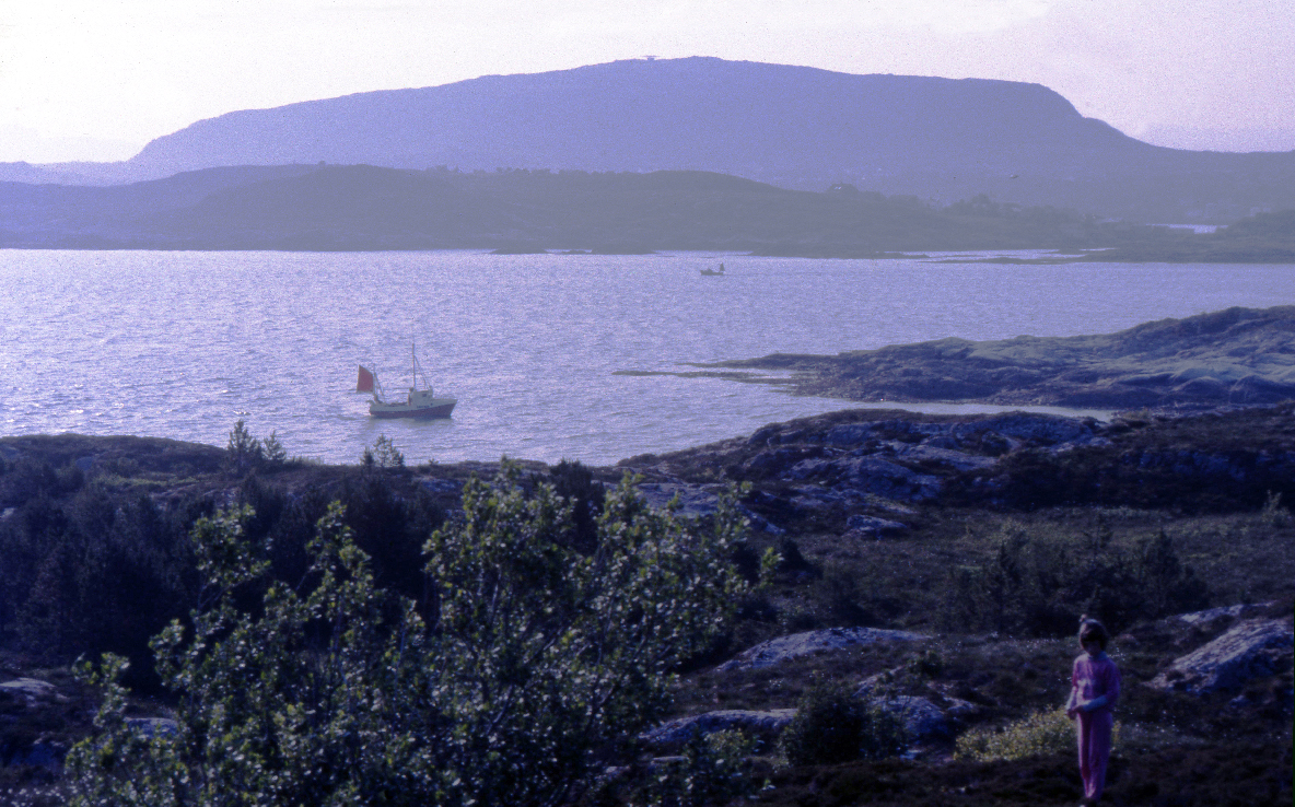 Kvernberget mountain seen from west